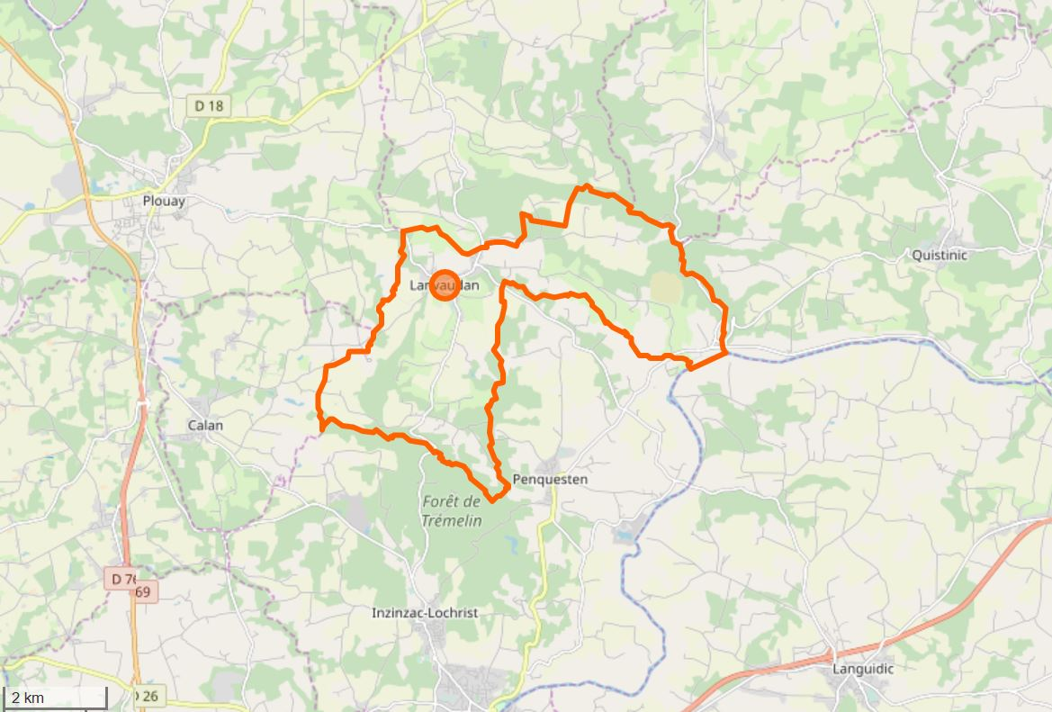 Cette carte a été créée à partir des données du site Openstreetmap. This map may be incomplete, and may contain errors. Don't rely solely on it for navigation.